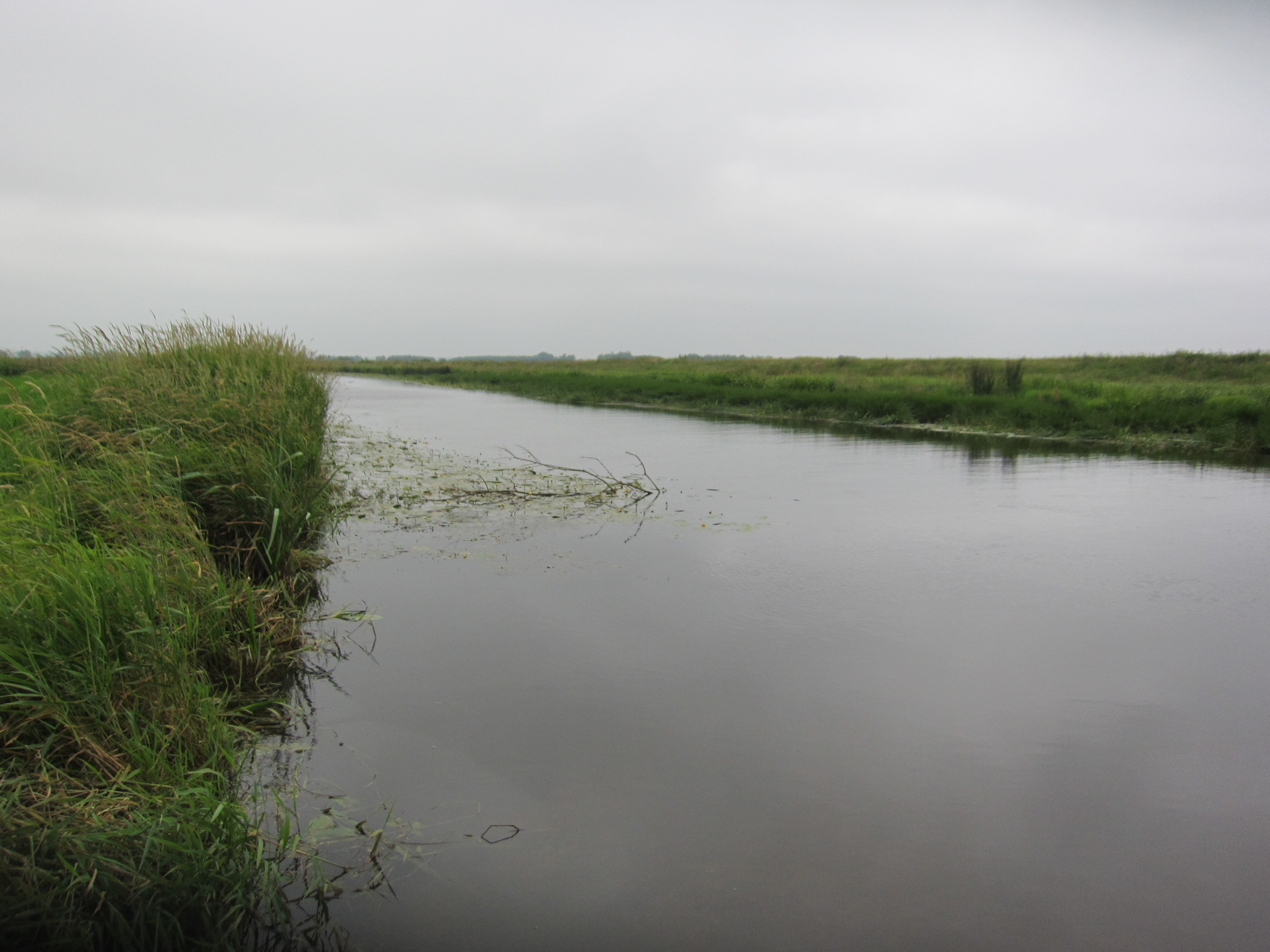 Fluss "Treene" in Dörpstedt